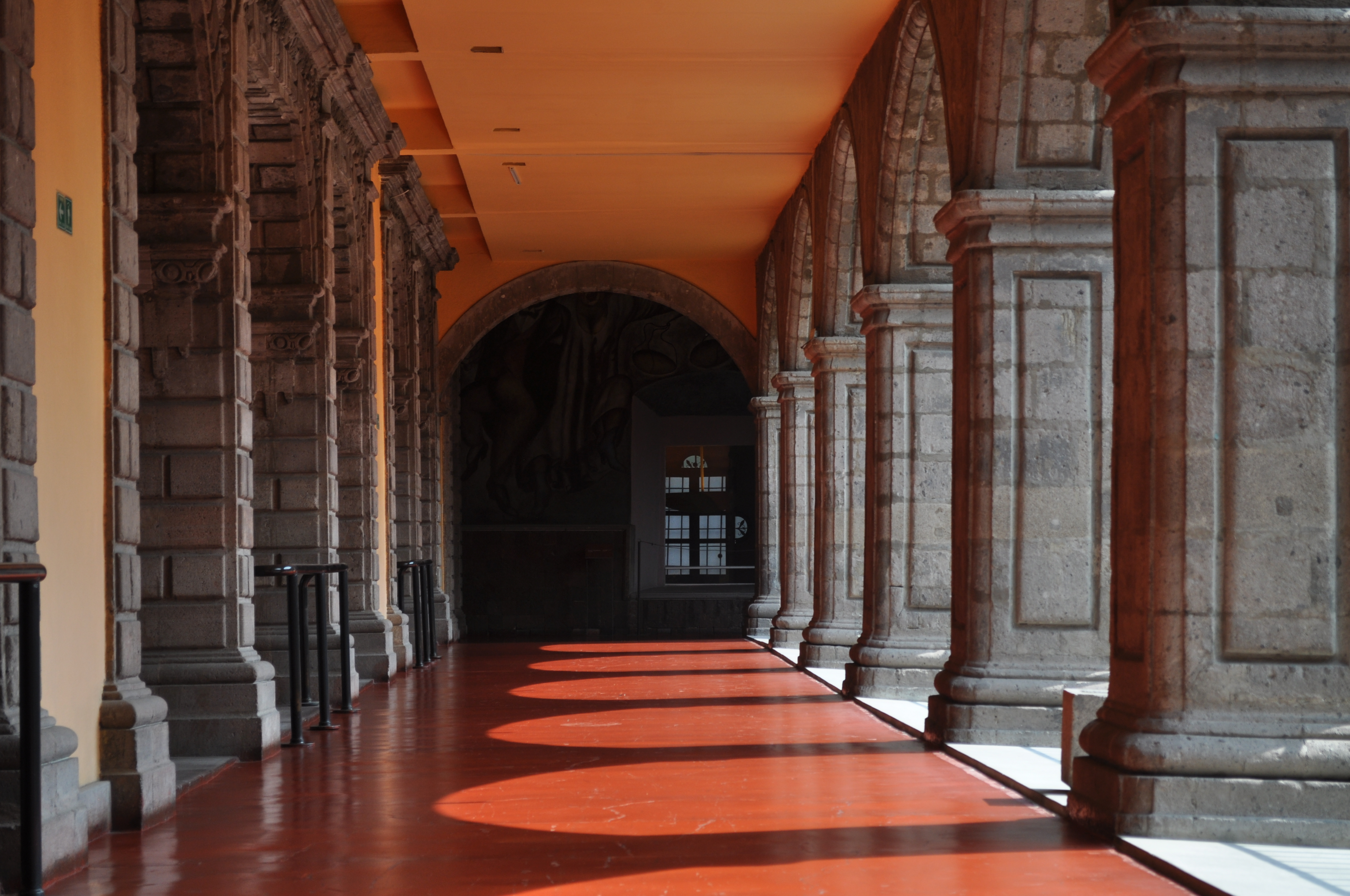 Colegio de San Ildefonso